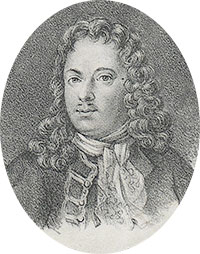 Nils Gripenhielm (1653-1706)